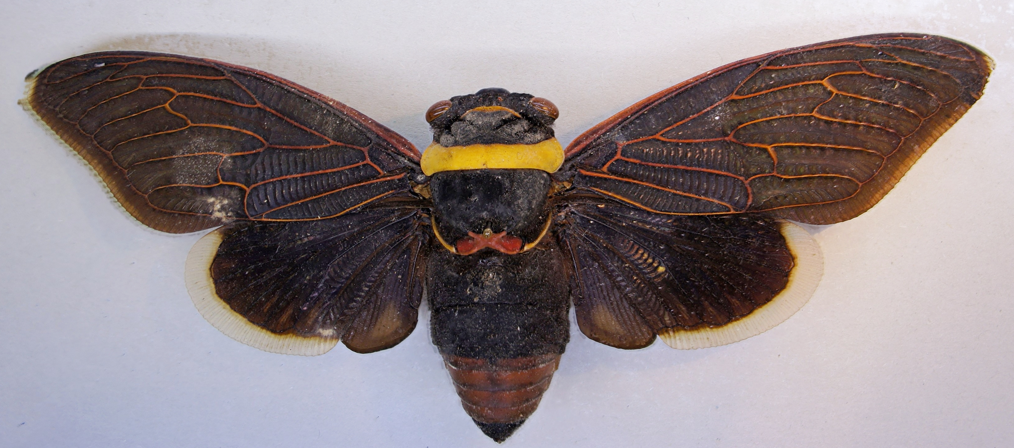 Tacua speciosa (Distant, 1892)